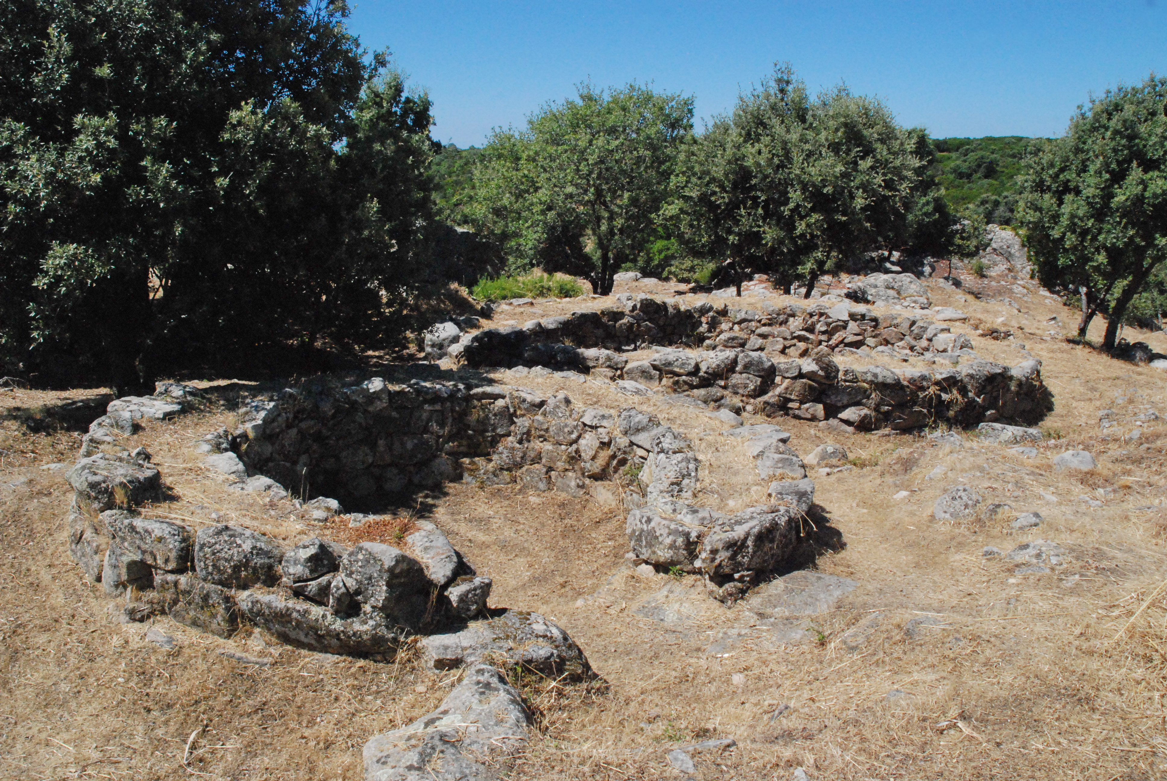 Villaggio nuragico di S'Urbale - MIBAC This is a photo of a monument which is part of cultural heritage of Italy.